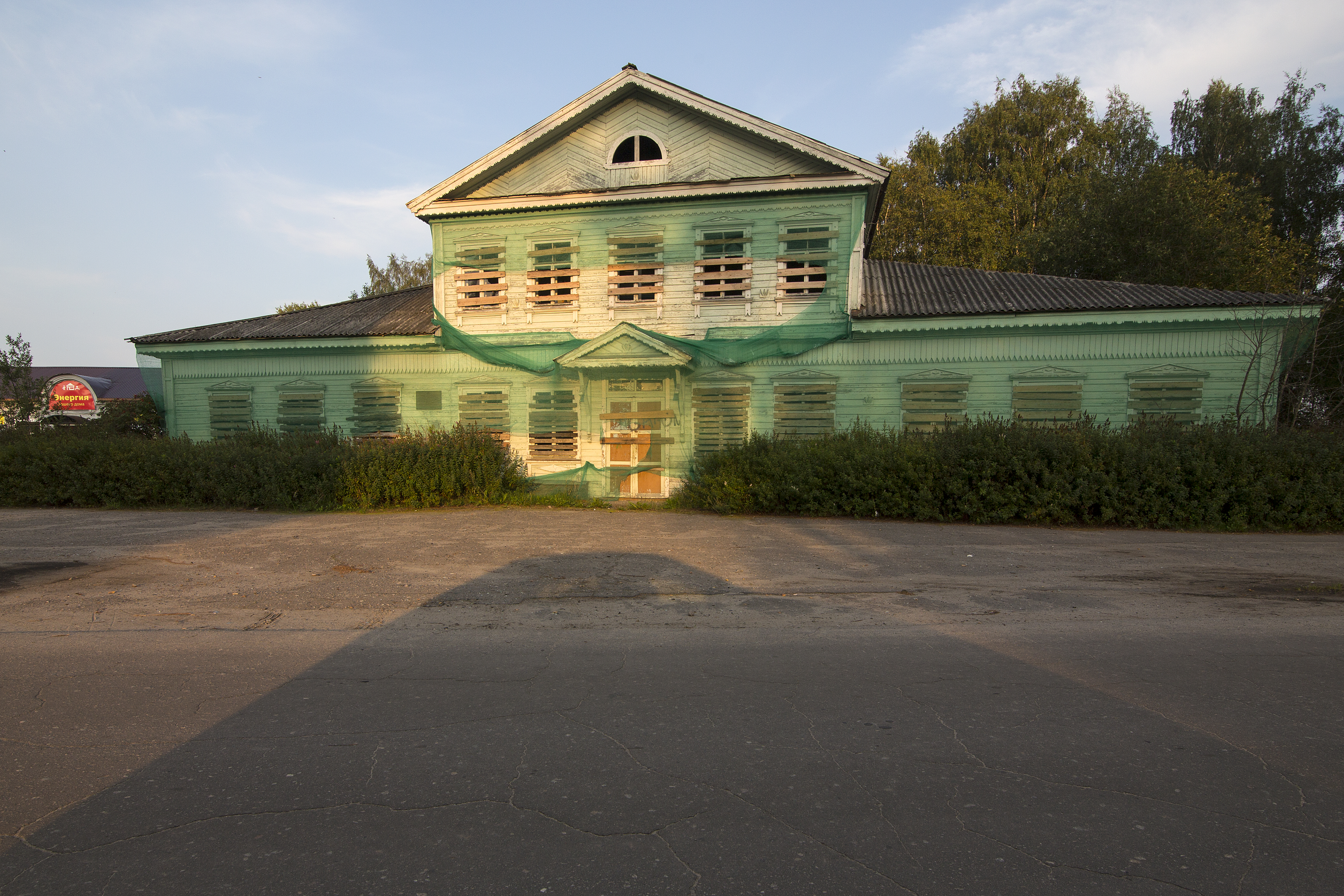 Чайная Егорова: улица Горького, 27, Пудож, Пудожский район, Карелия